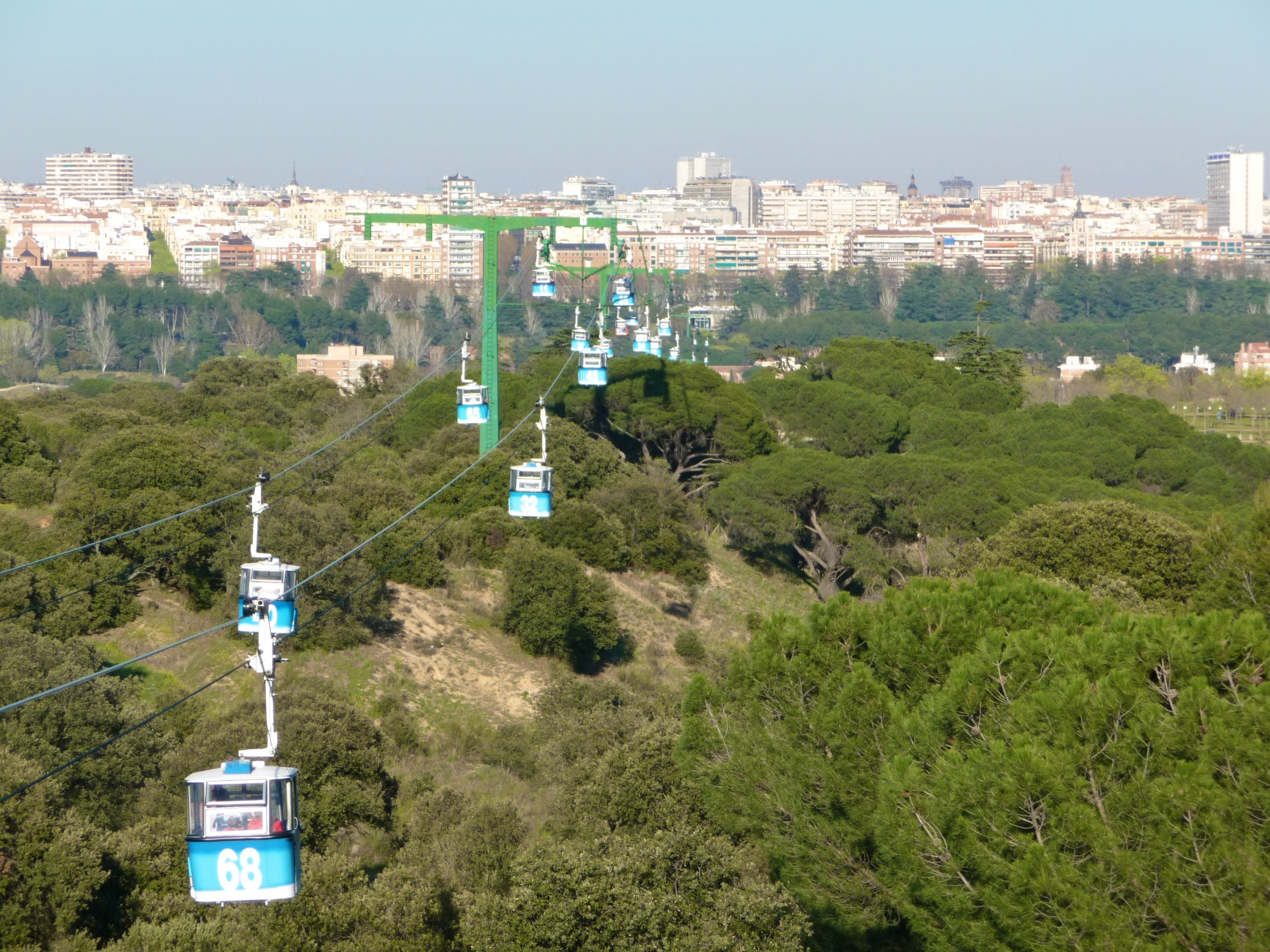 Madrid desde el teleférico que lleva a la Casa de Campo